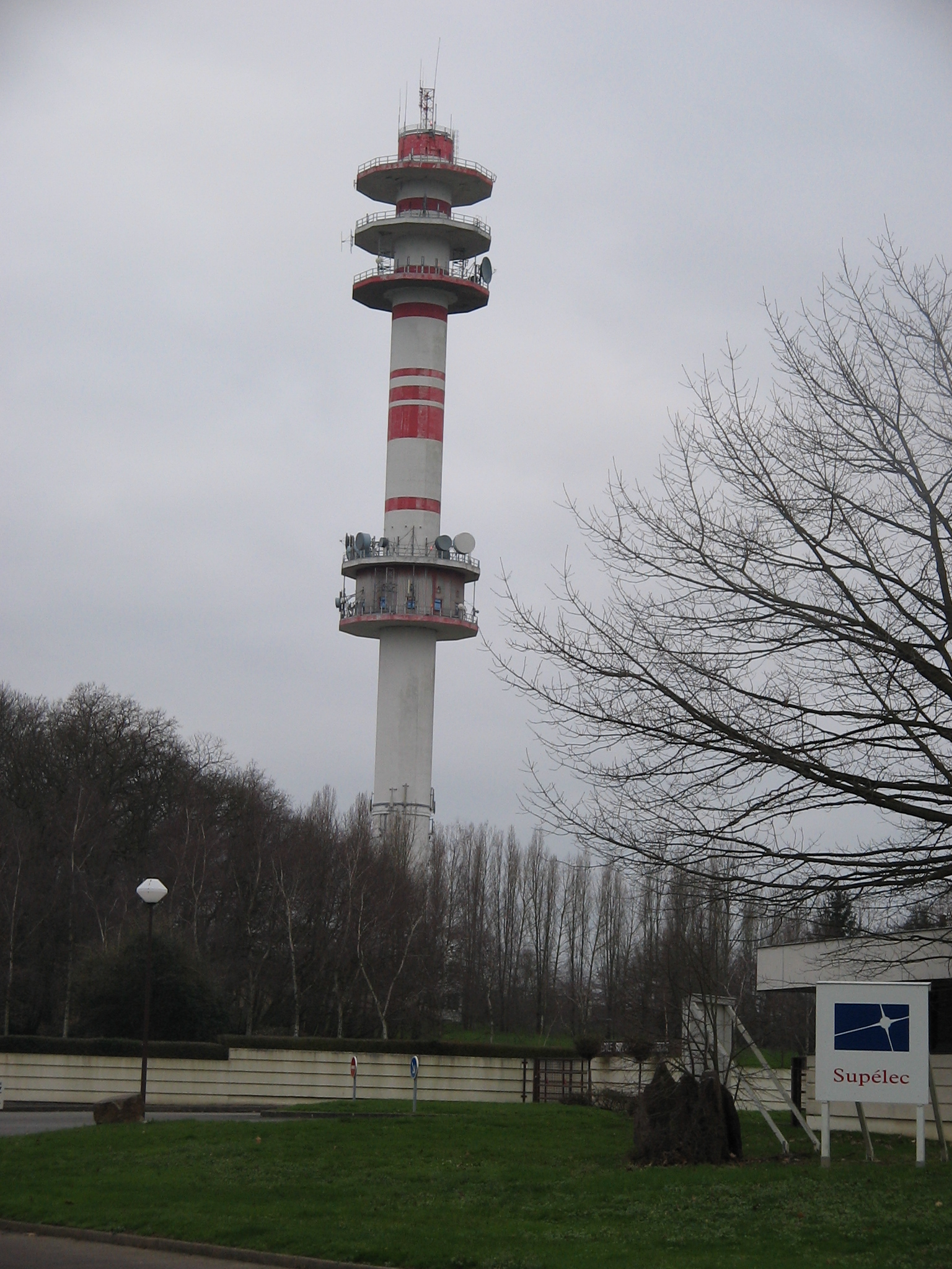 Tour de télécom à Cesson-Sévigné